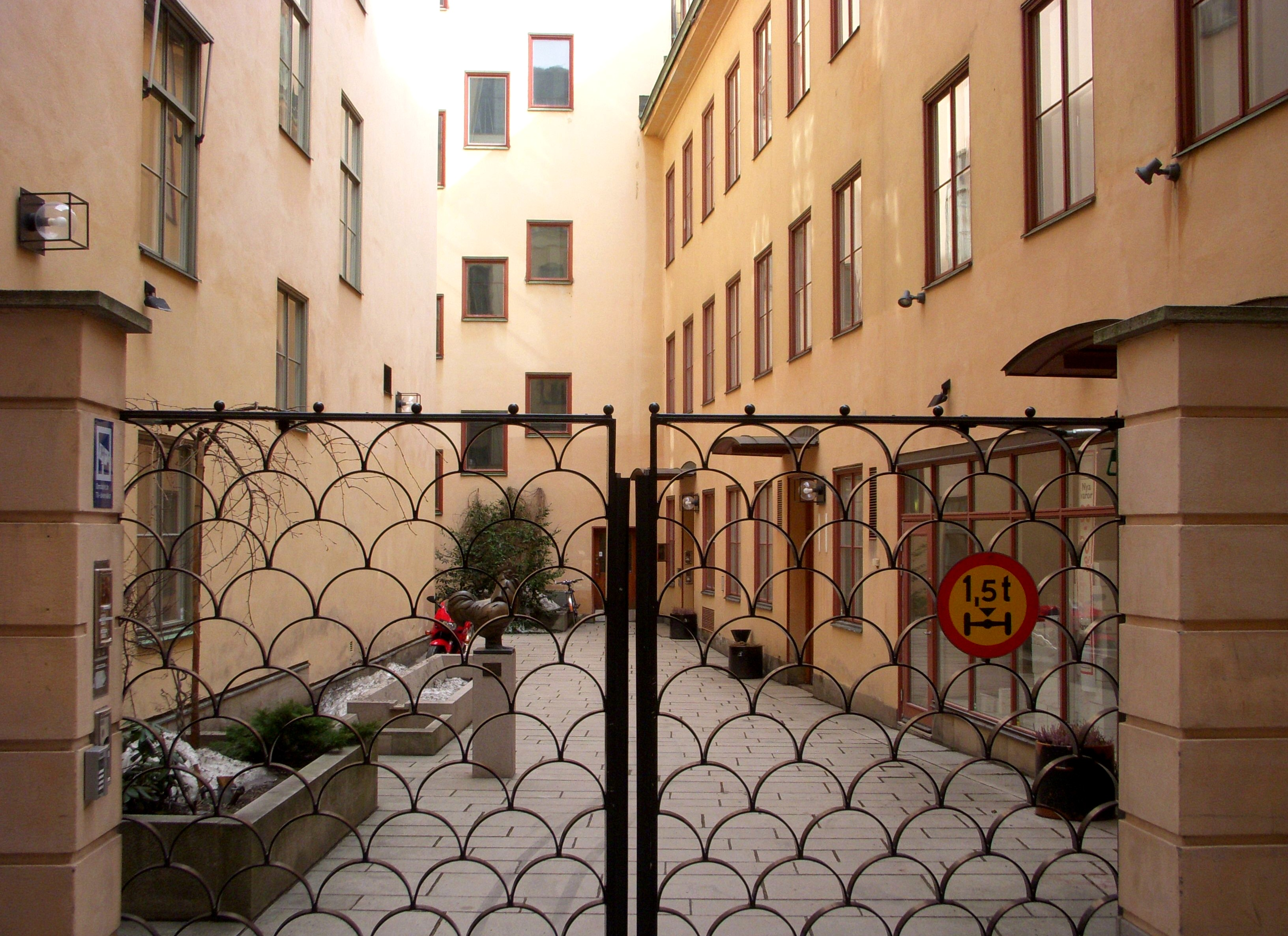 Österlånggatan 1 innergård till k. Aeolus